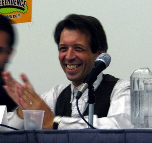 Durante el panel de Troma, comentando sobre el cómic del Toxic Avenger Cropped by Magnus Manske 14:48, 6 October 2007 (UTC)